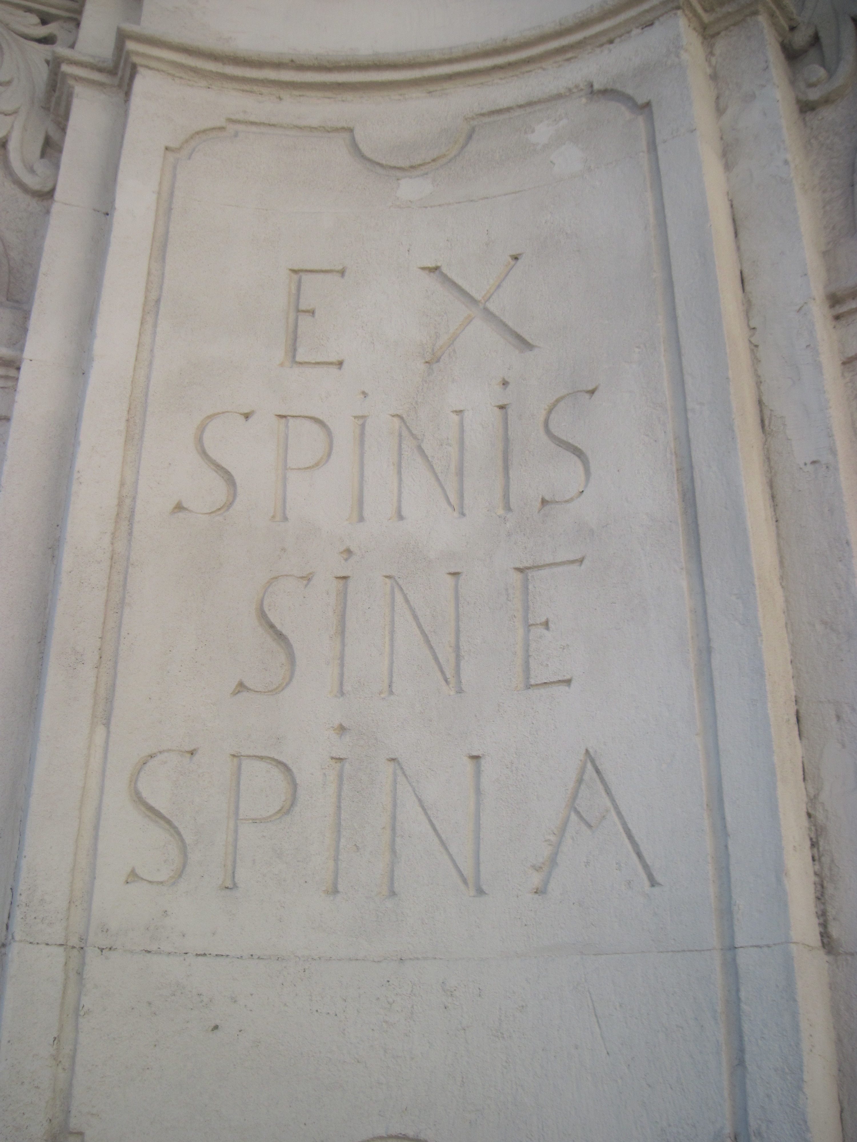 Статуя ПДМ, Бучач, 2015